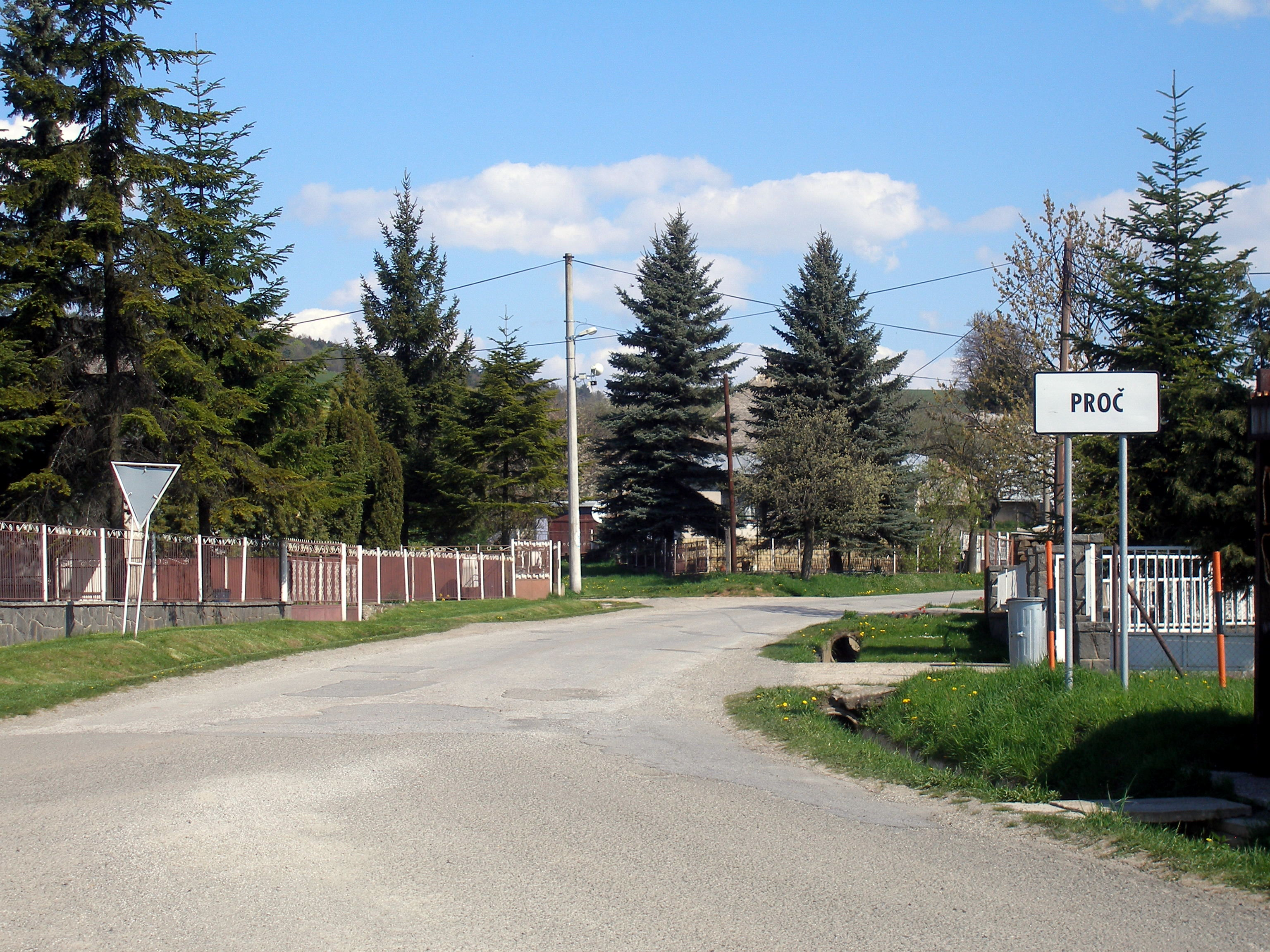 Obec Proč okres Prešov región Šariš